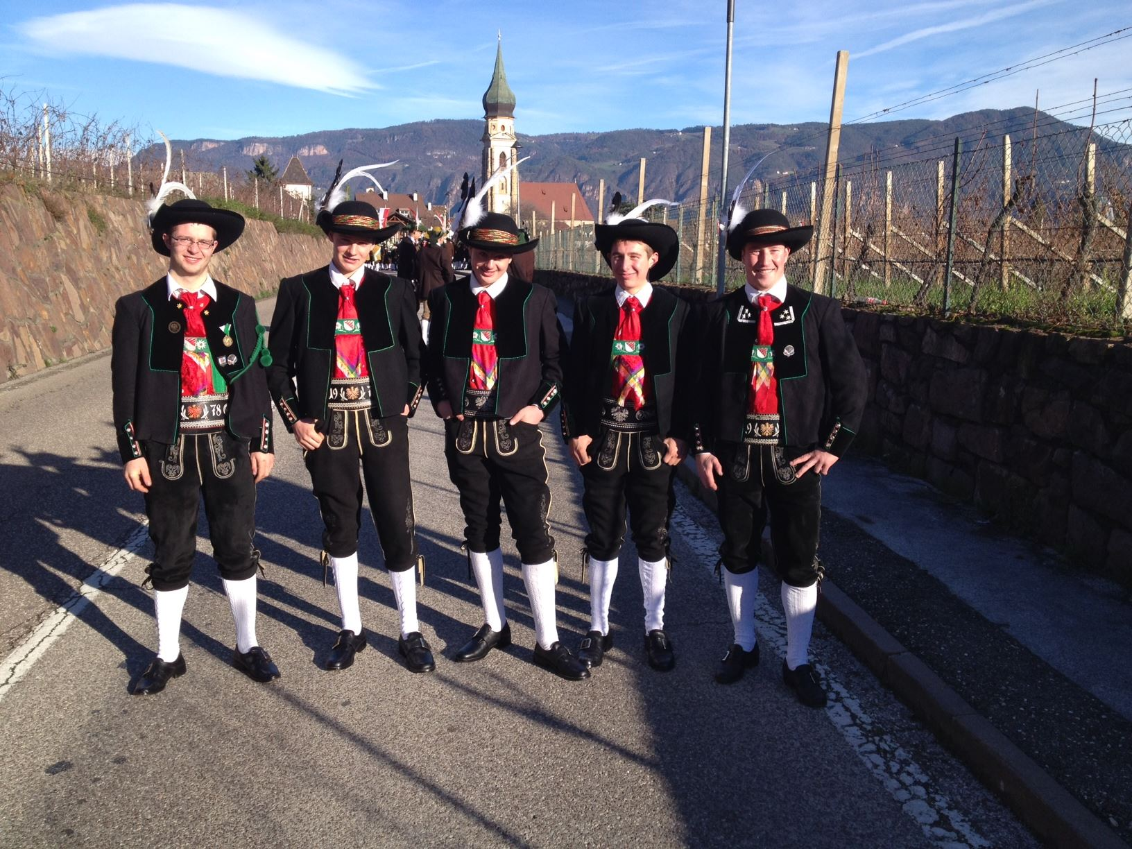 Junge Schützen in der Jenesiener Schützntracht